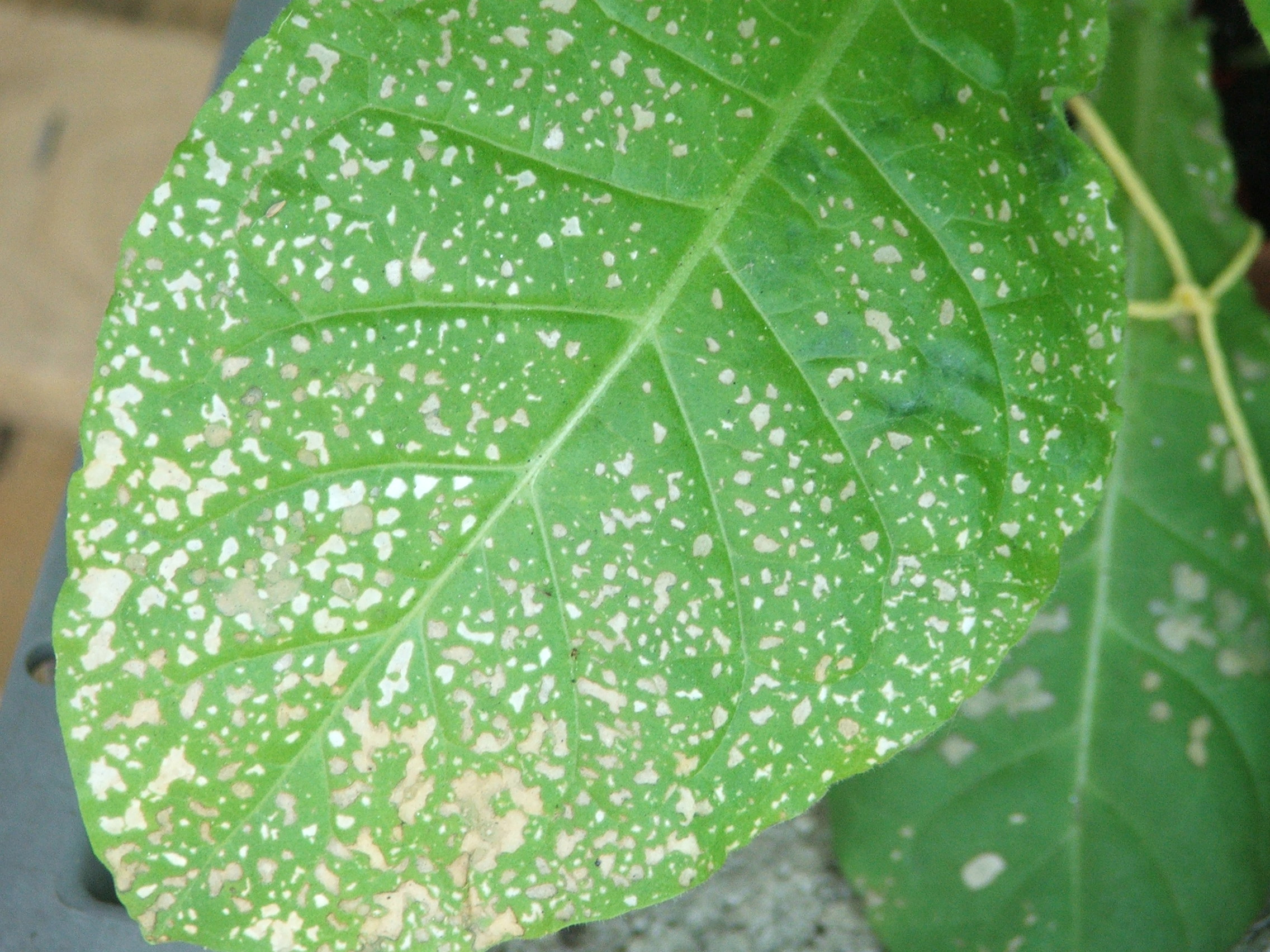 Feuille de tabac nécrosée en raison de la pollution à l'ozone (bioindication)